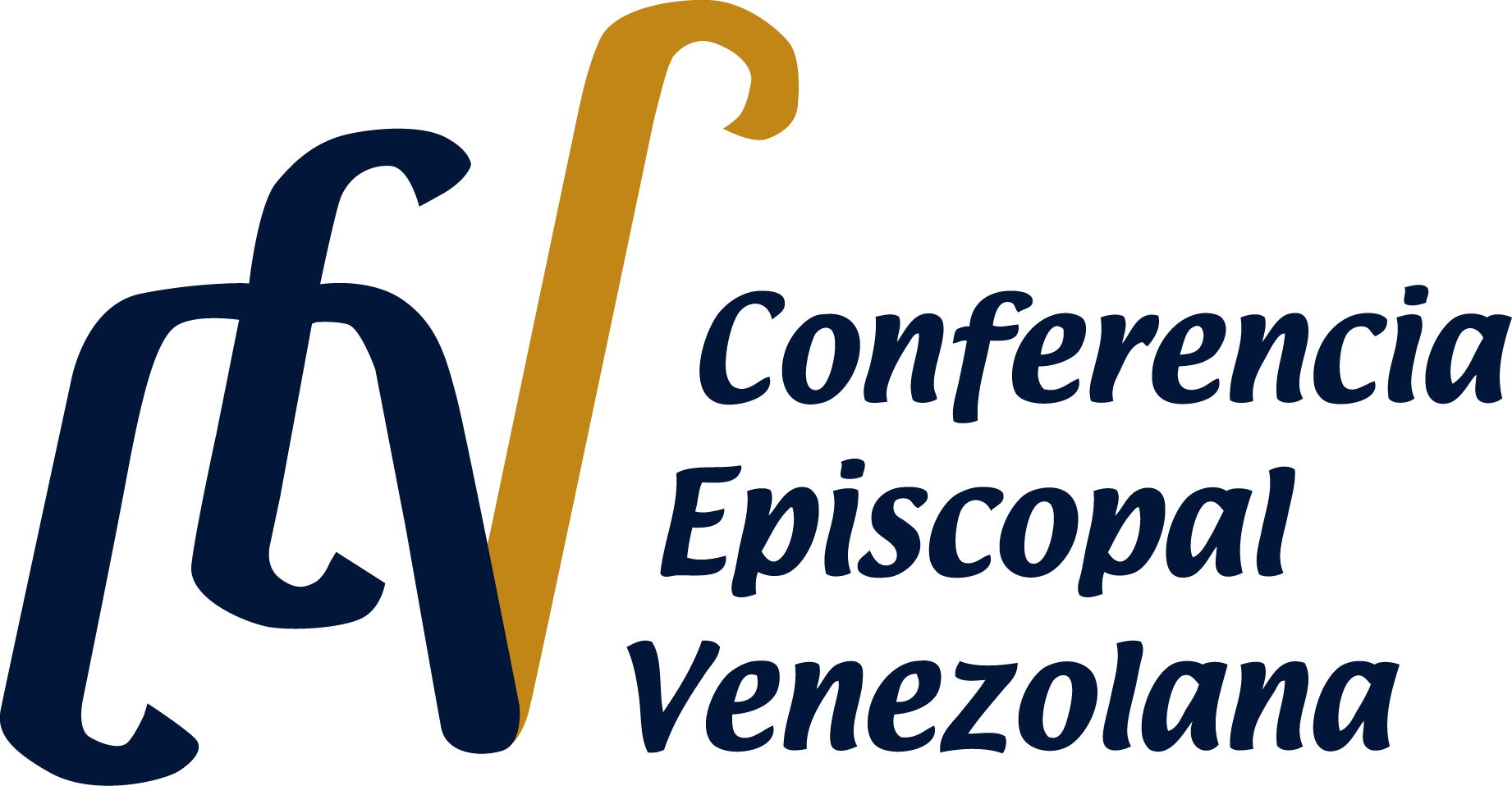 Logo oficial de la Conferencia Episcopal Venezolana